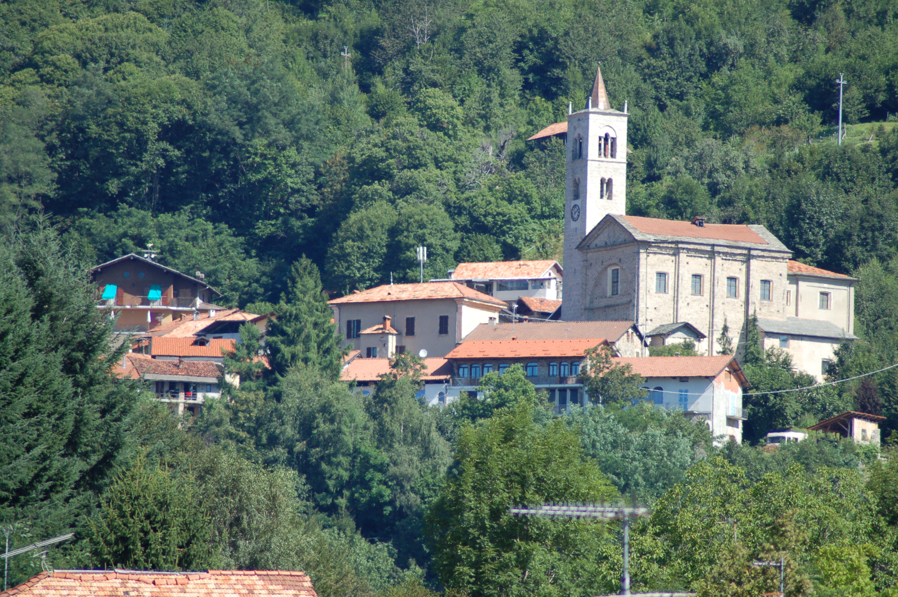 Autore: Angelo Carnevale. Panorama di Breia